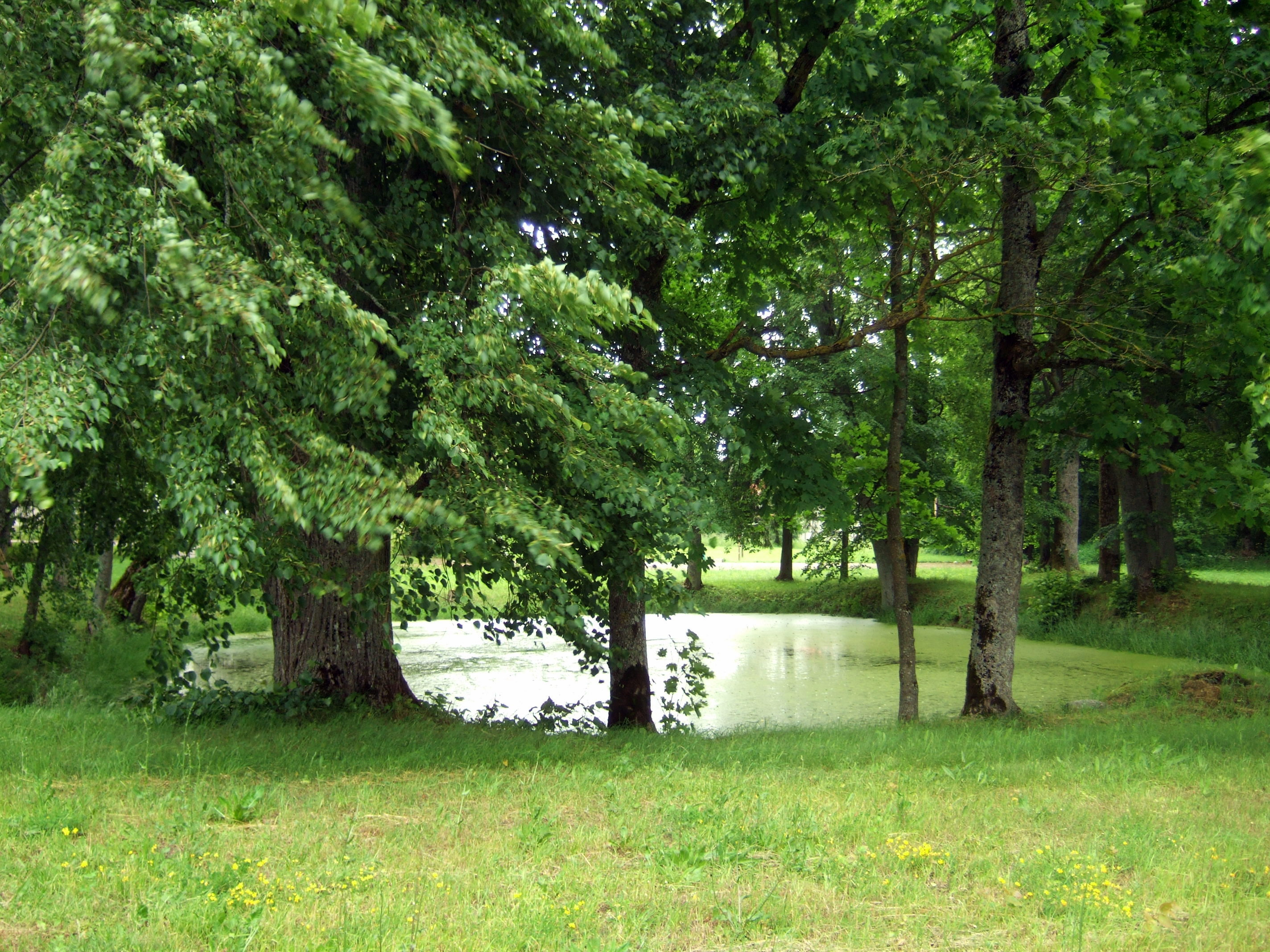 Laukžemės dvaro parko tvenkinys